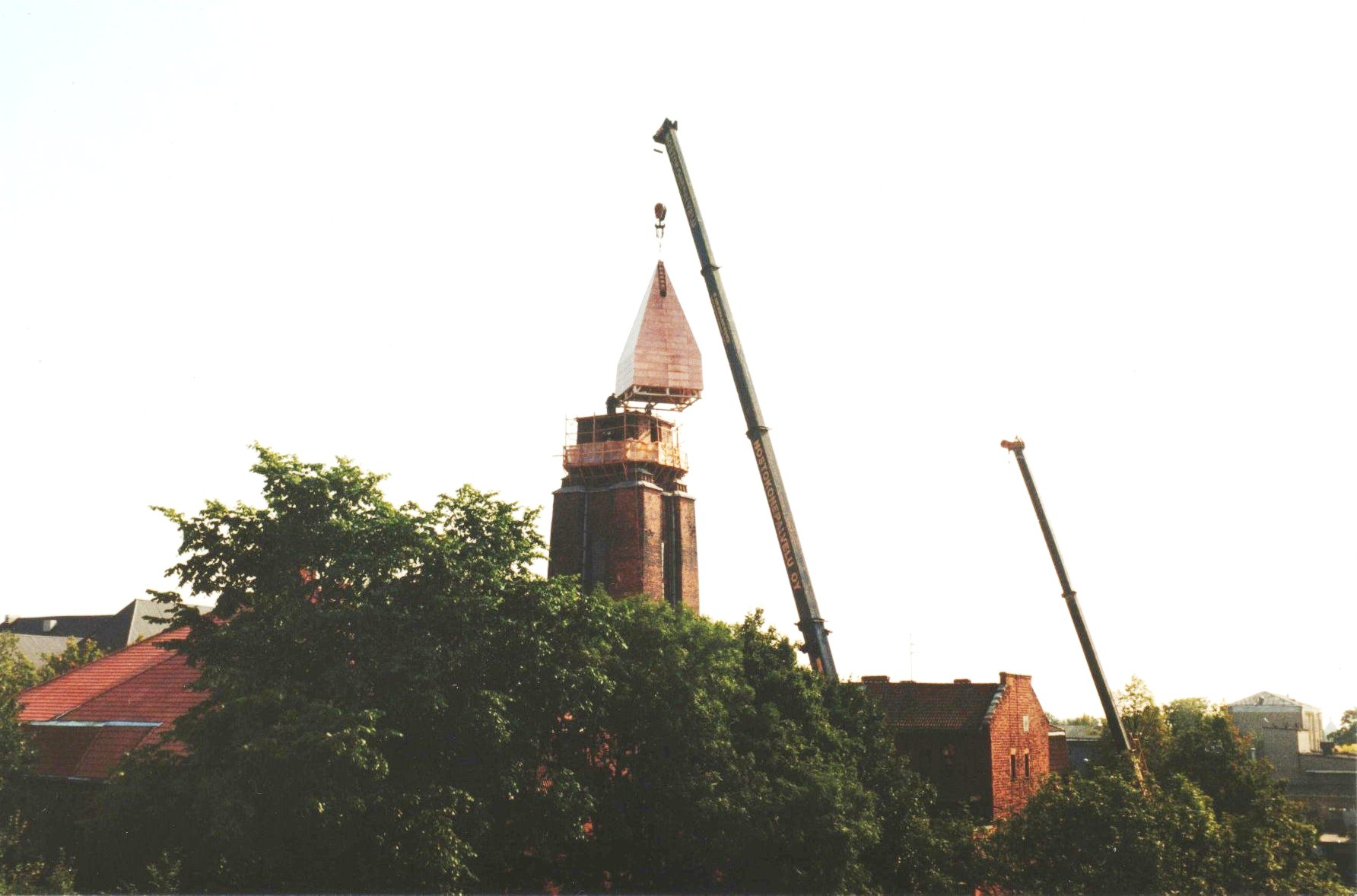 Tartu Pauluse kirik saab taas tornikiivri